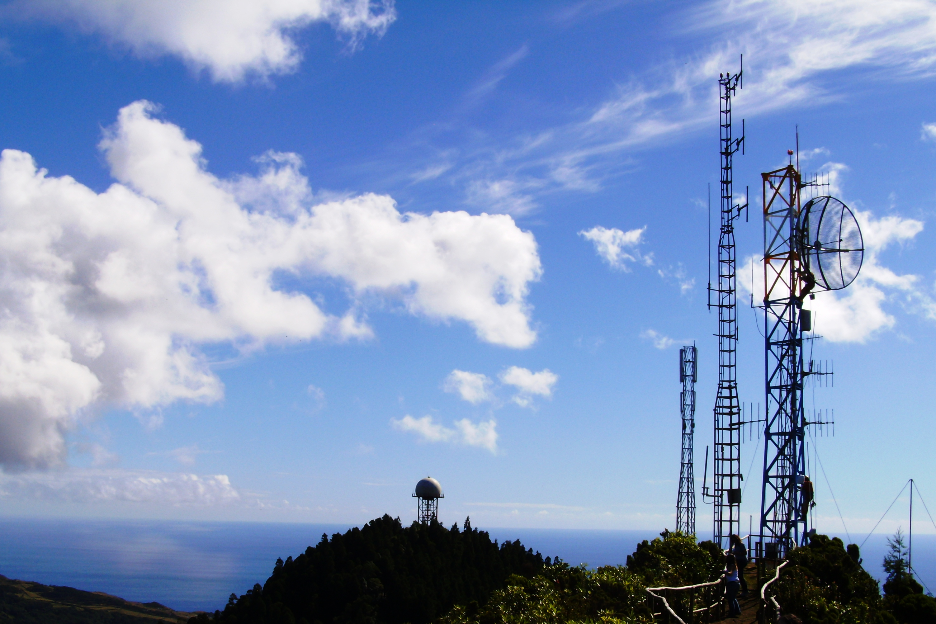 Pico Alto, concelho de Vila do Porto, ilha de Santa Maria, Açores: detalhe das torres de comunicações.